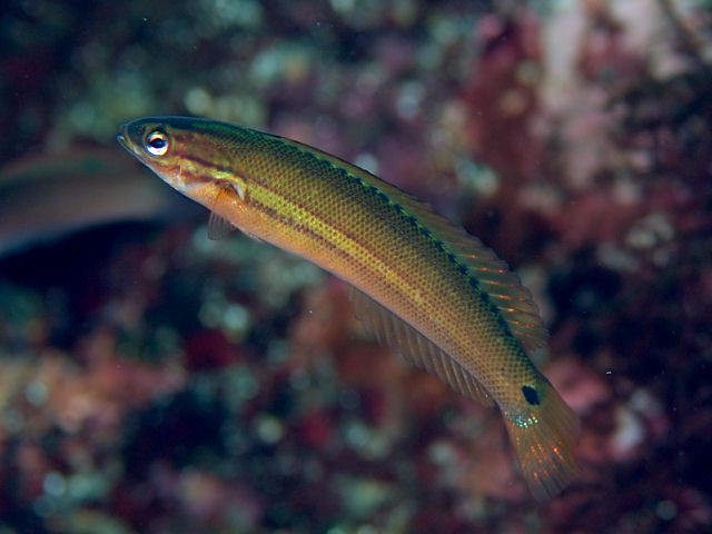 シュードコリス・オセラータ Pseudocoris ocellata